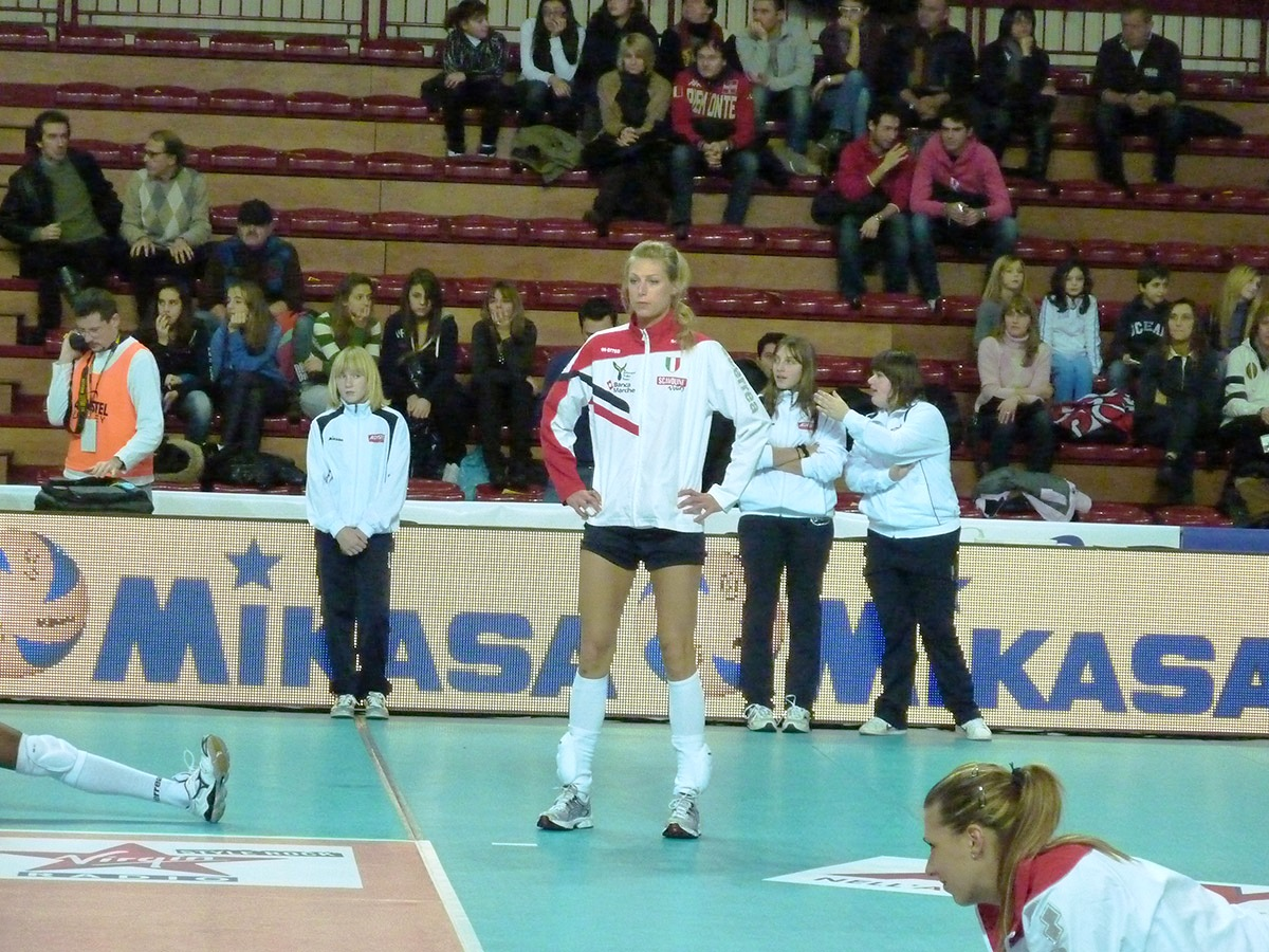 Manon Flier, pallavolista neerlandese, gioca nel ruolo di schiacciatrice ed opposto